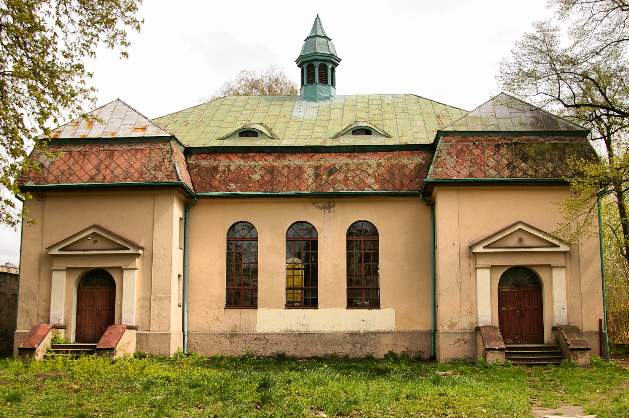 Kościół Polskokatolickiwgo pw. Matki Bożej Nieustającej Pomocy w Łodzi, ul. Żeromskiego 56